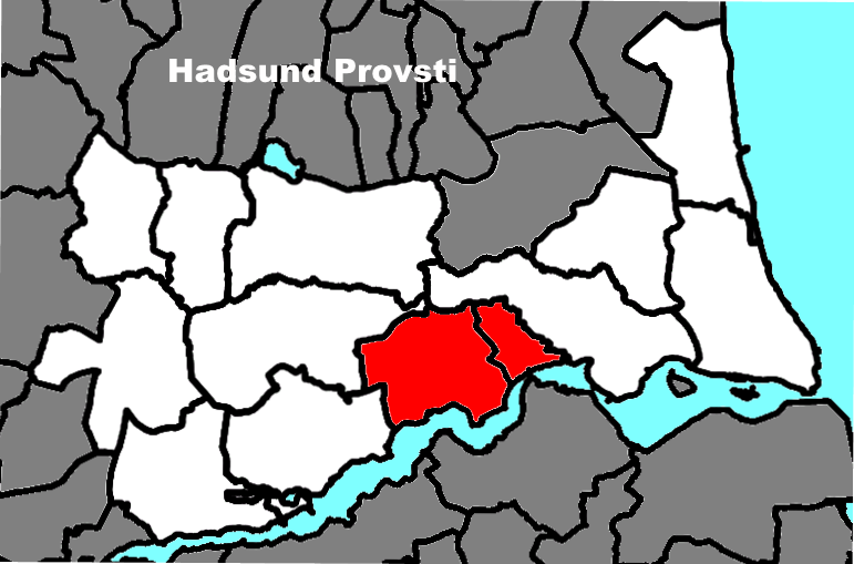 Pastorats beliggenhed i Hadsund Provsti.